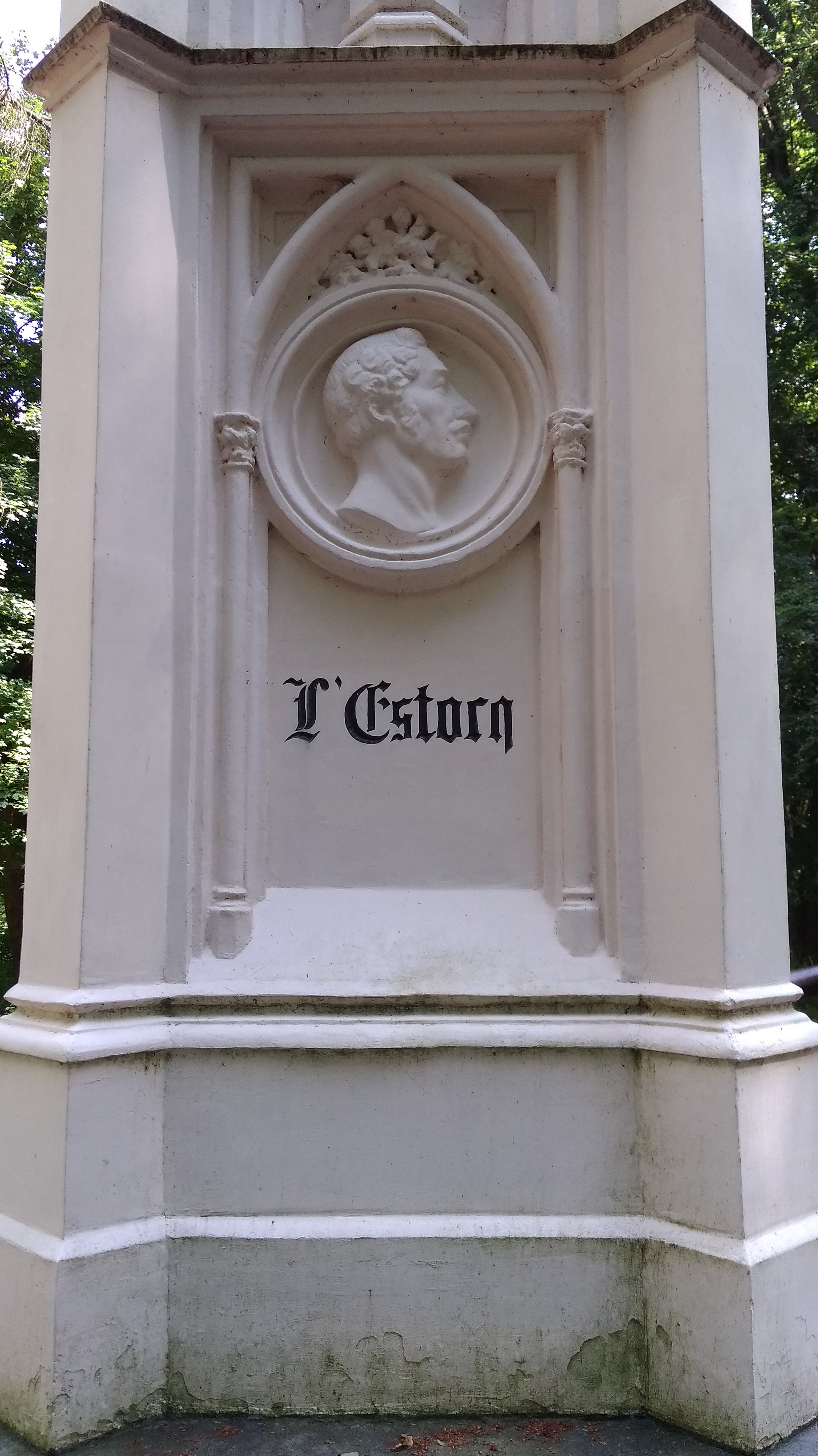 Памятник-обелиск Славы русского оружия: Багратионовск, Калининградская область